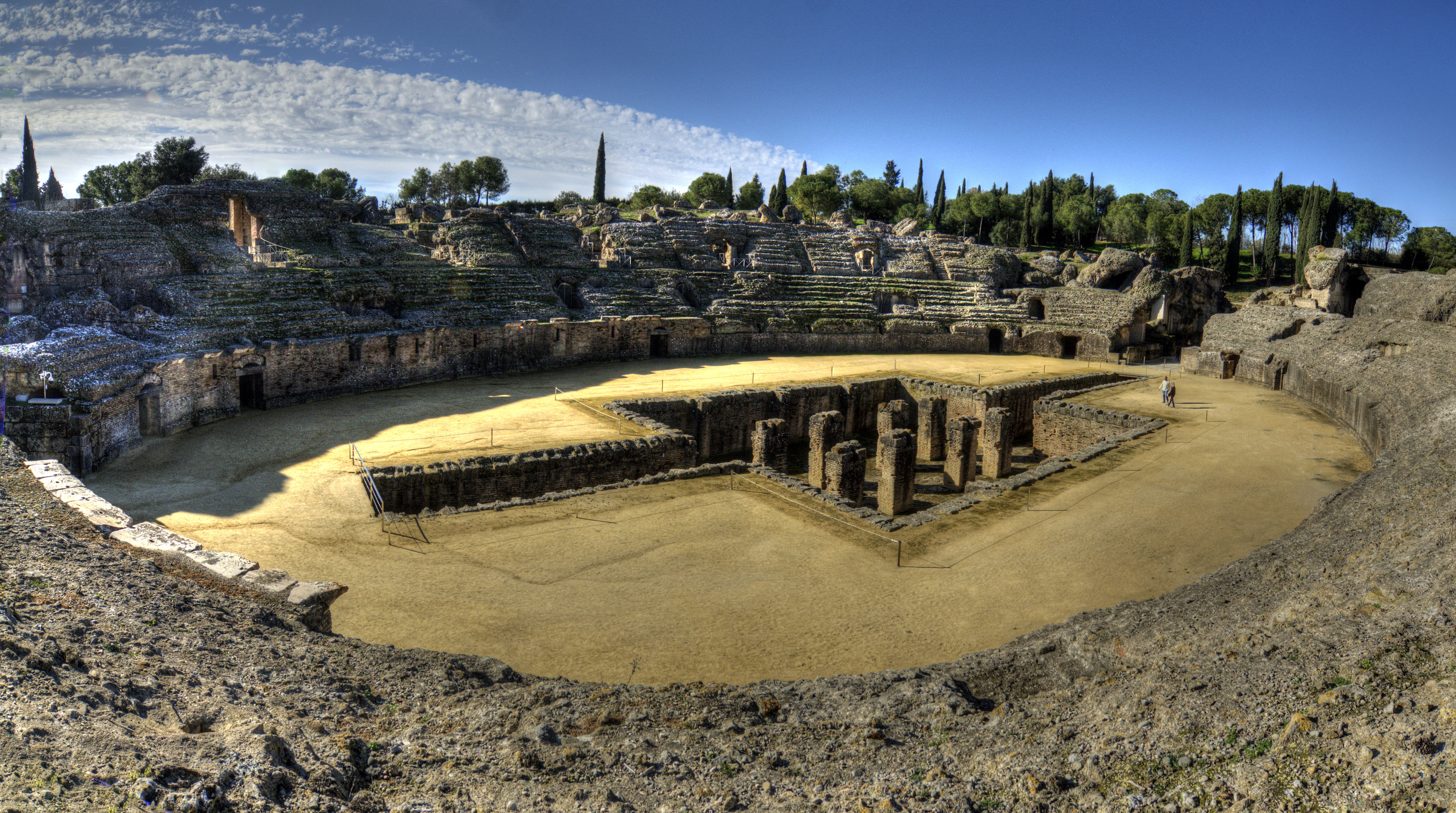 Itálica fue la primera ciudad romana fundada en Hispania, en el año 206 a.C., actualmente en Santiponce (Sevilla, España). Su anfiteatro se construyó en la época del emperador Adriano, entre los años 117-138 d.C. Tenía una capacidad de 25000 espectadores y medía 160 x 137 m.